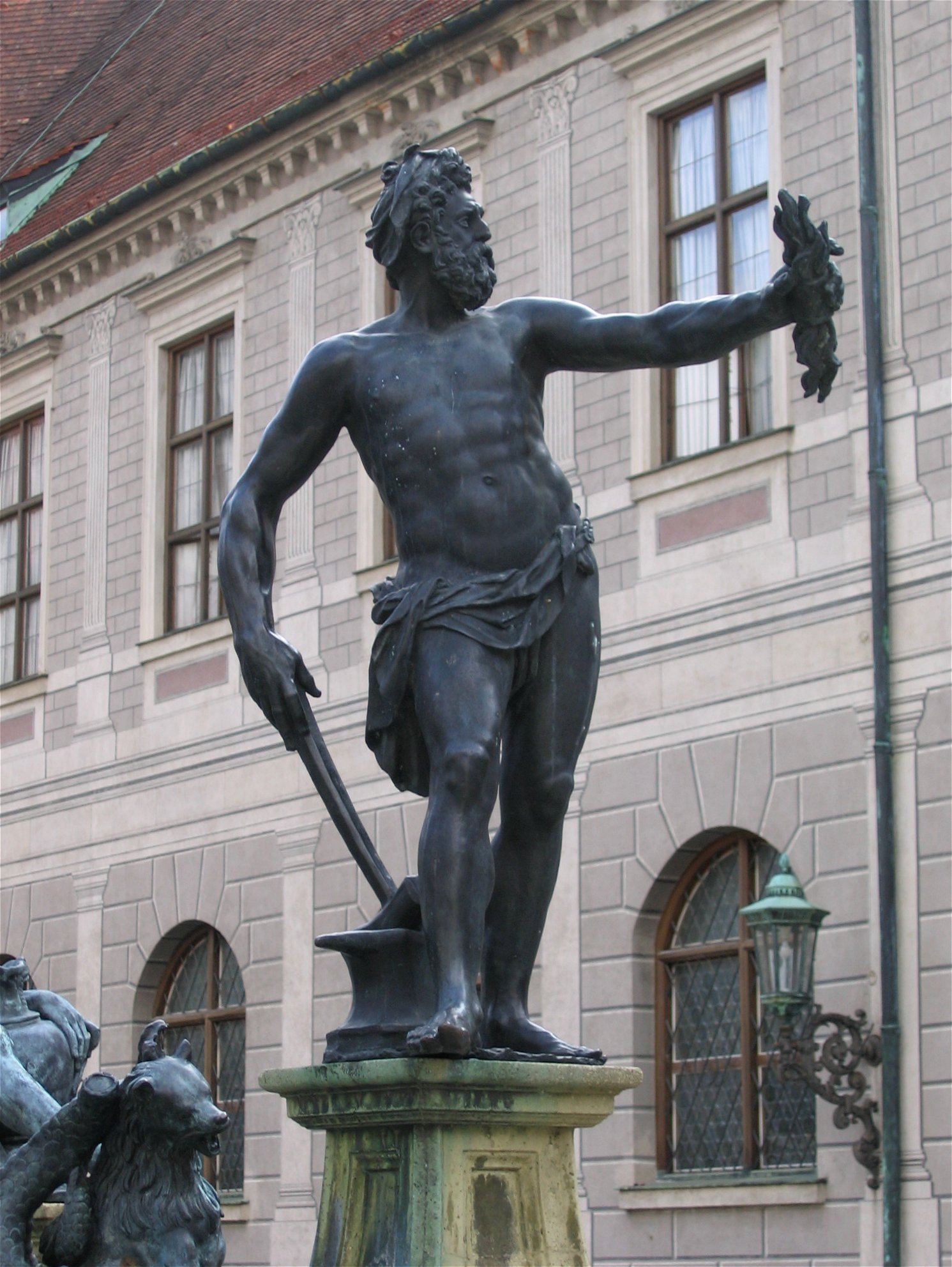 Wittelsbacherbrunnen, Detail, Brunnenhof der Residenz, München